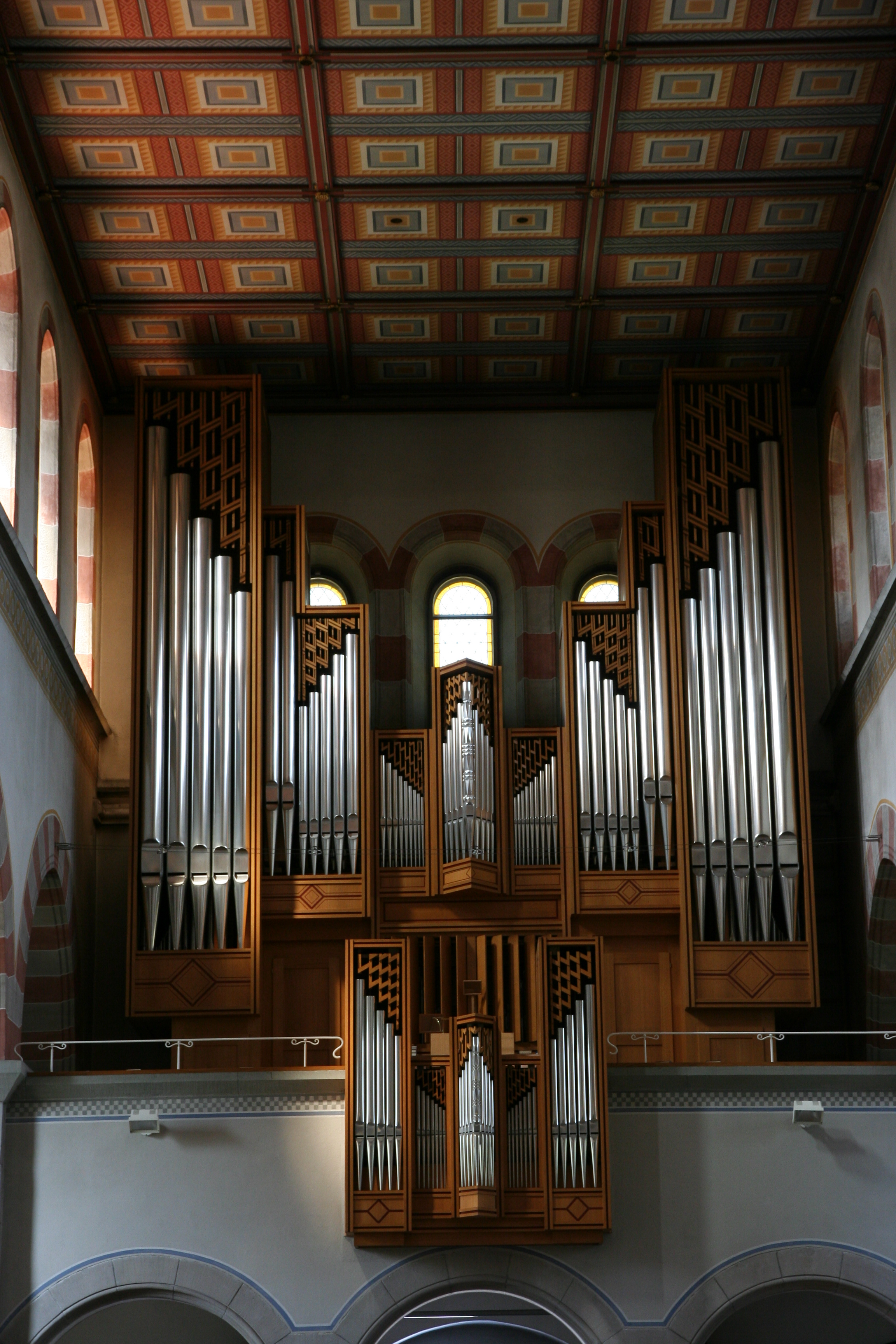 Römisch-katholische Pfarrkirche St. Georg Küsnacht ZH